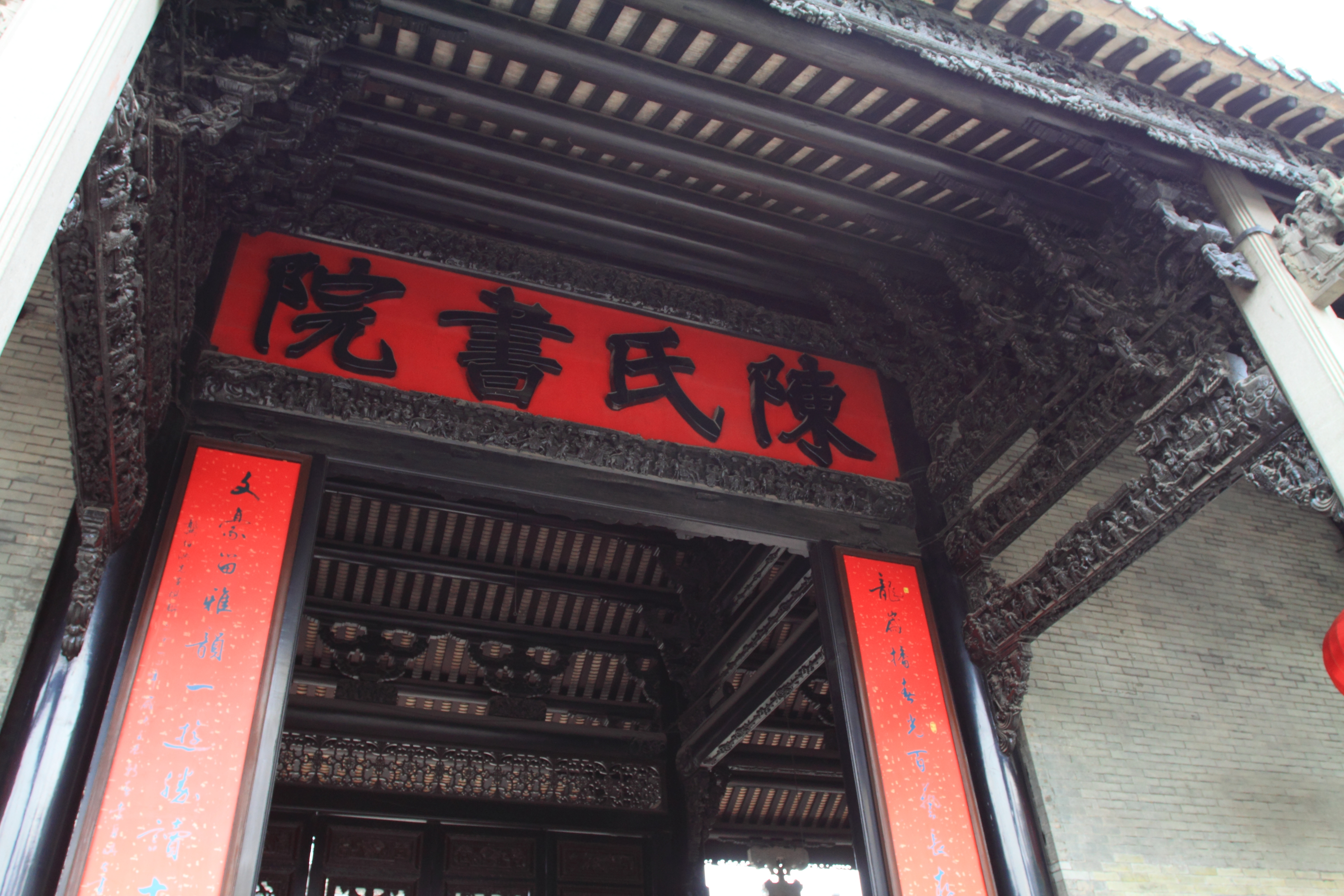 广州陈家祠堂 —— 南部大门